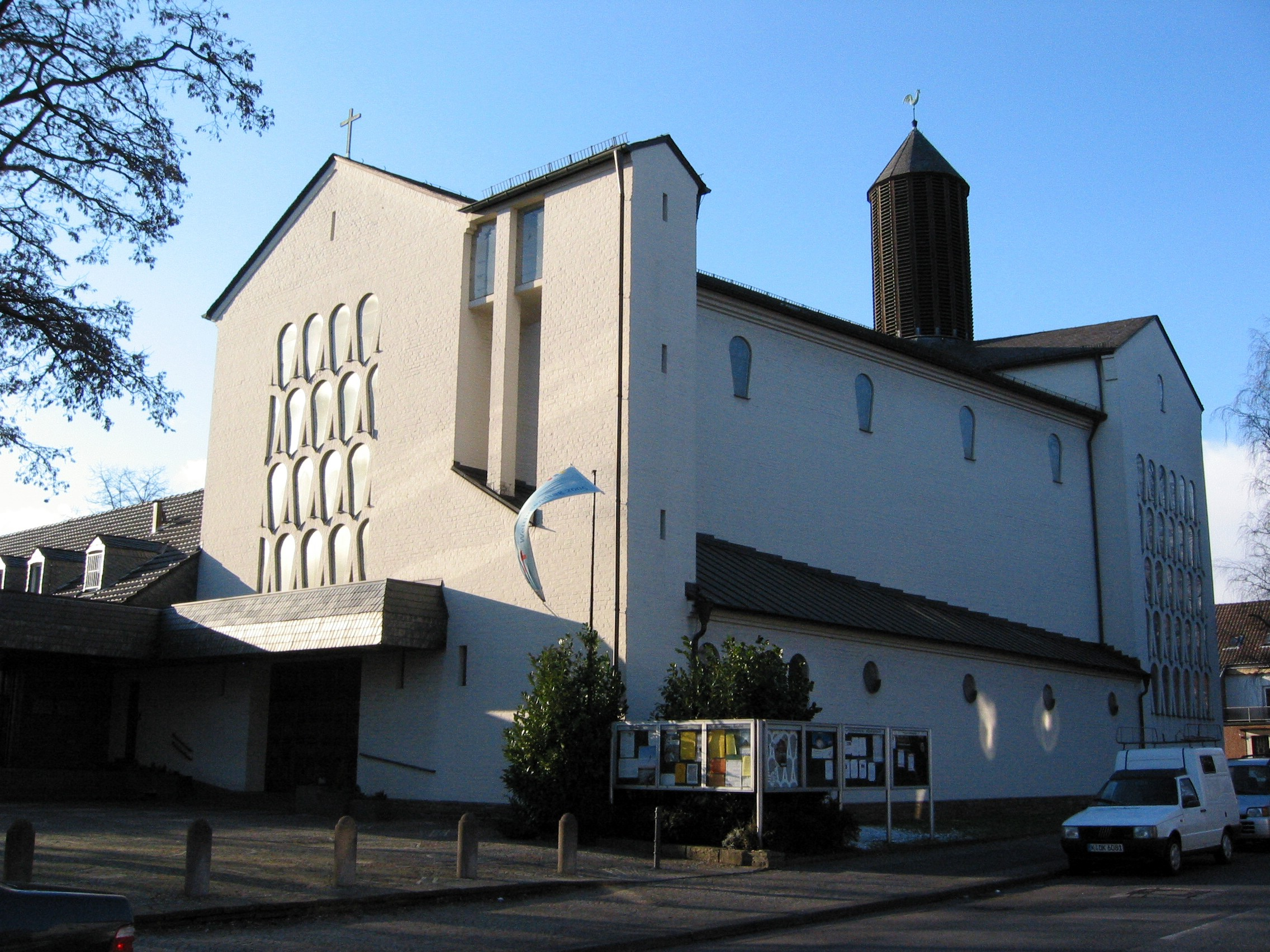 Köln-Höhenhaus St. Johann Baptist